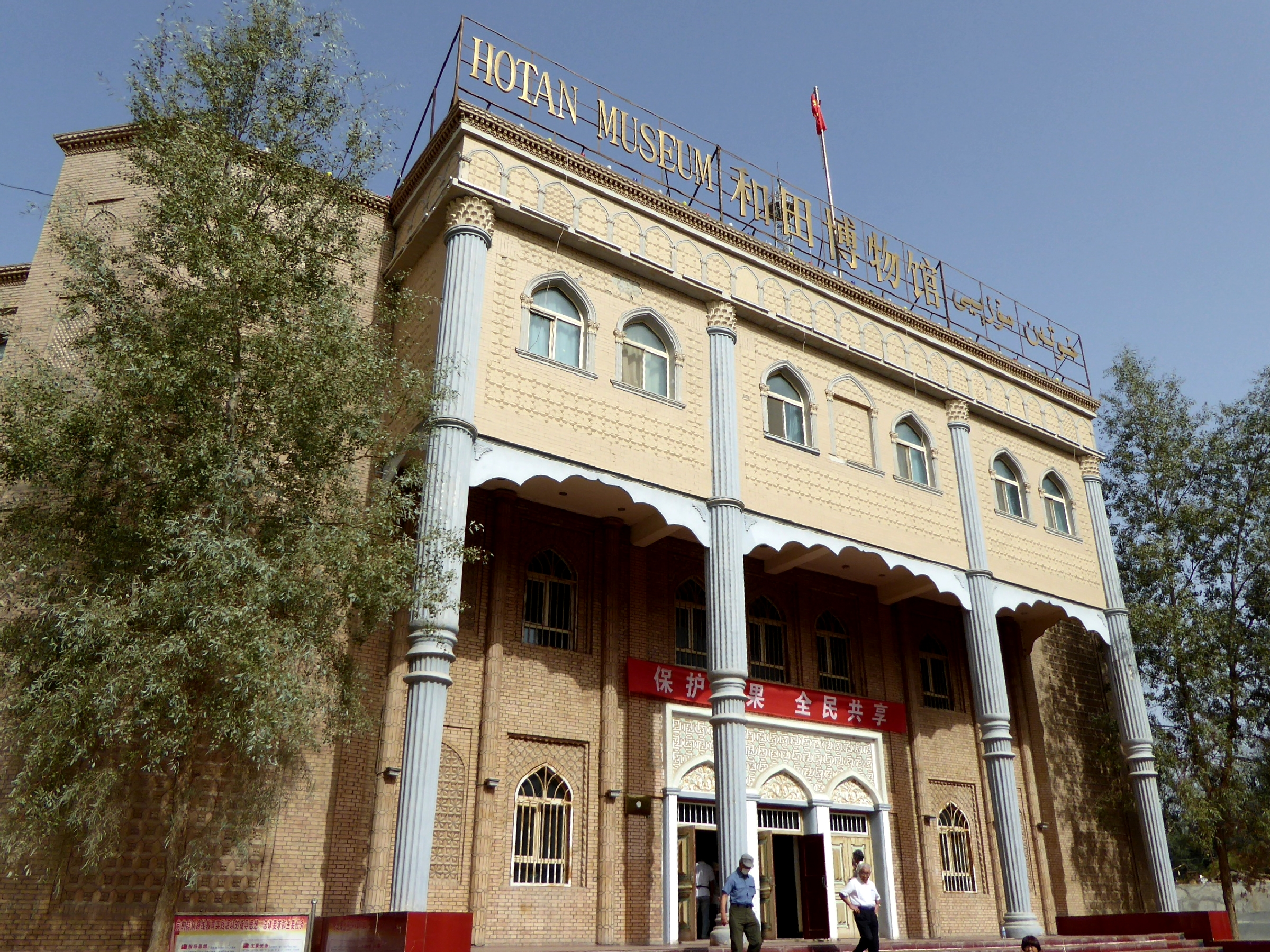 Hotan Museum Hotan Xinjiang China 新疆 和田 和田博物馆